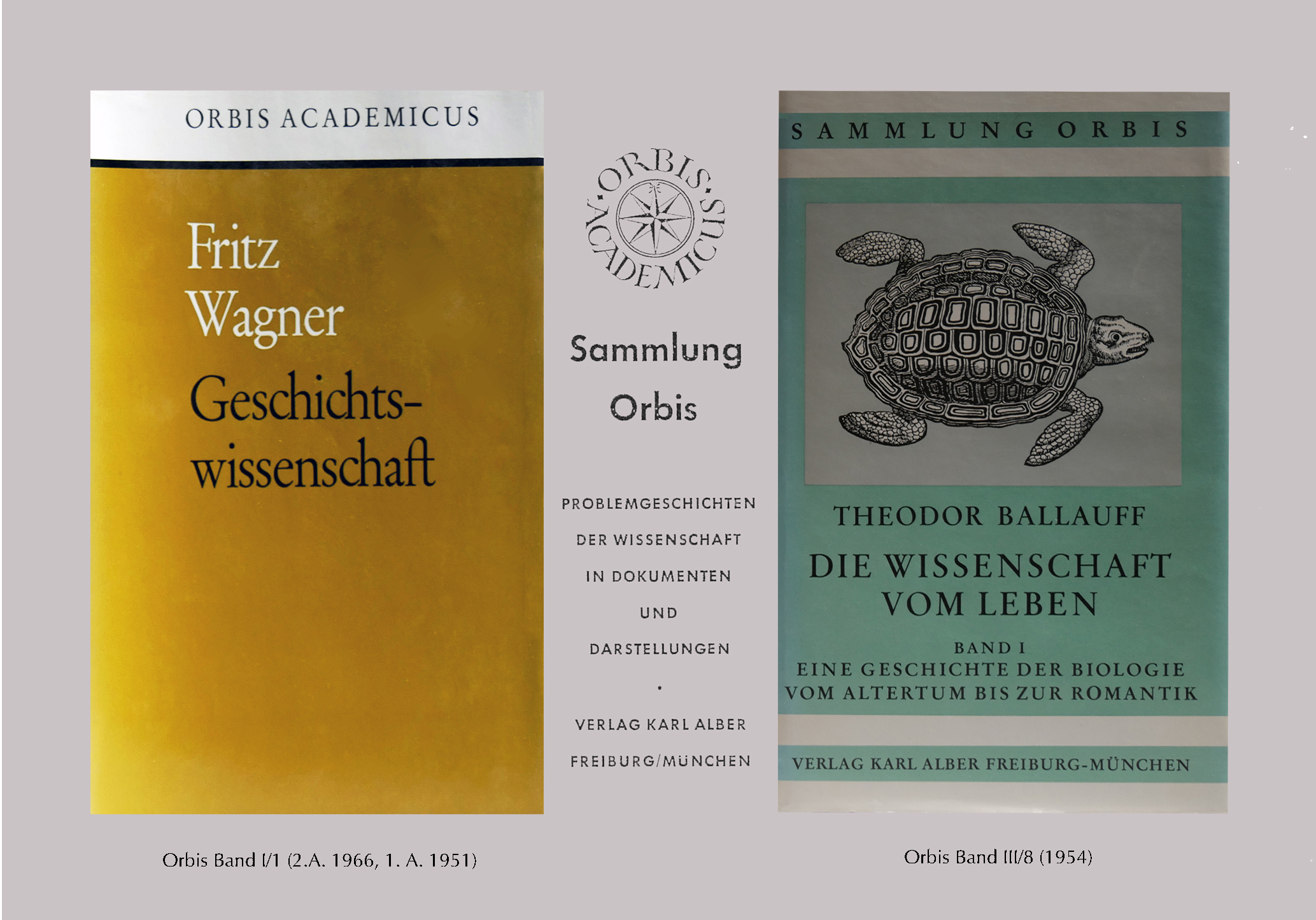 ORBIS ACADEMICUS BAND I/1 UND III/8 Umschläge